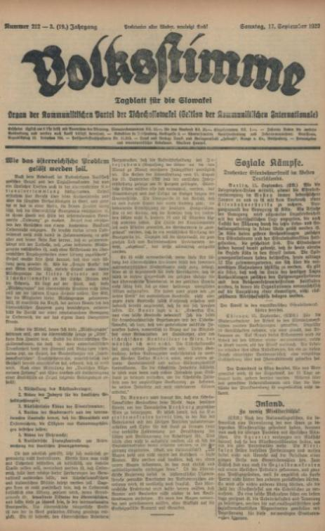 Titulný list denníka Volksstimme, ktorý vychádzal v Bratislave po prvej svetovej vojne.